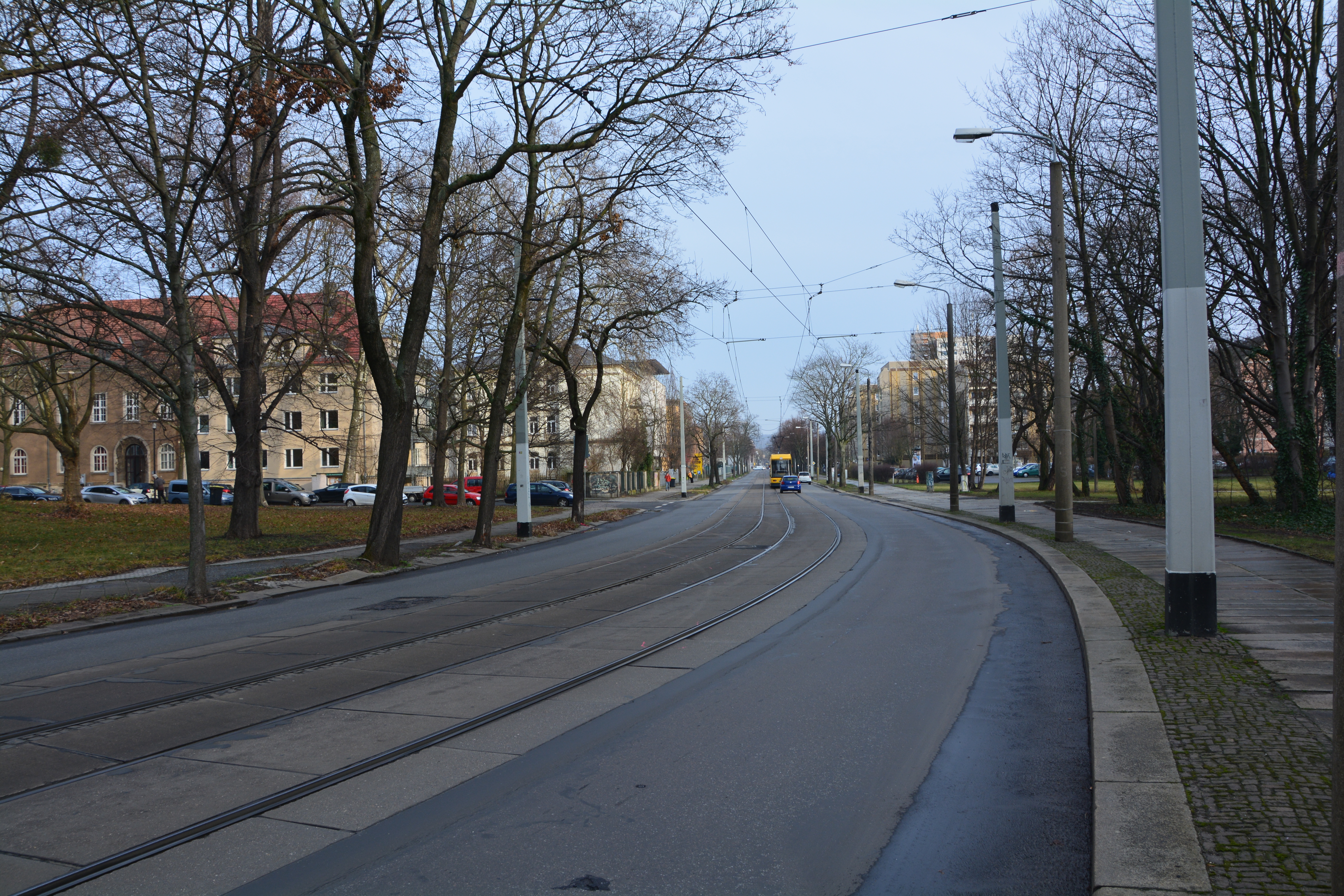 Dresden, Blasewitzer Straße 2018. Trinitatisplatz, Blick Richtung Fetscherstraße